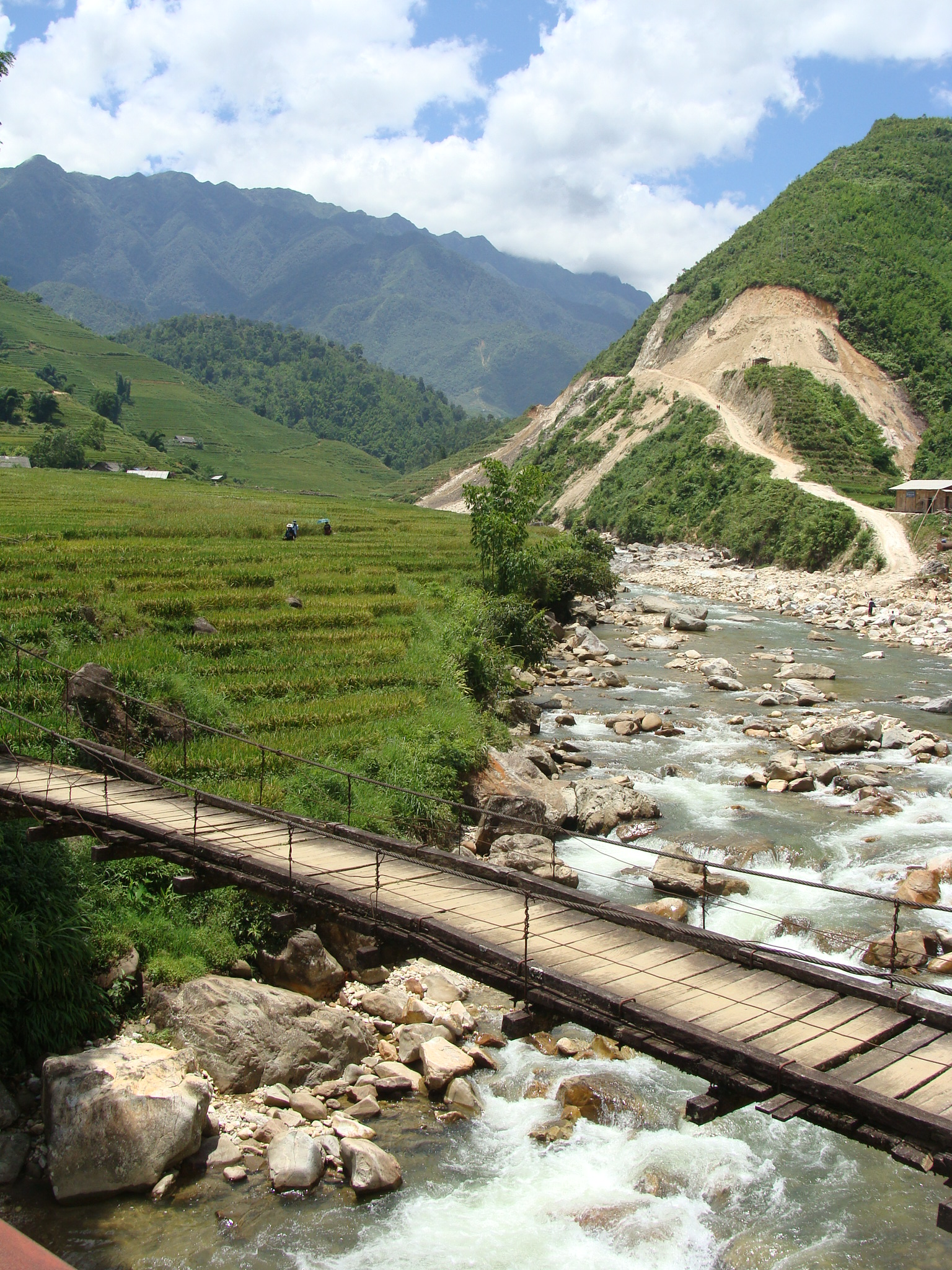 Village vietnam sapa bridge